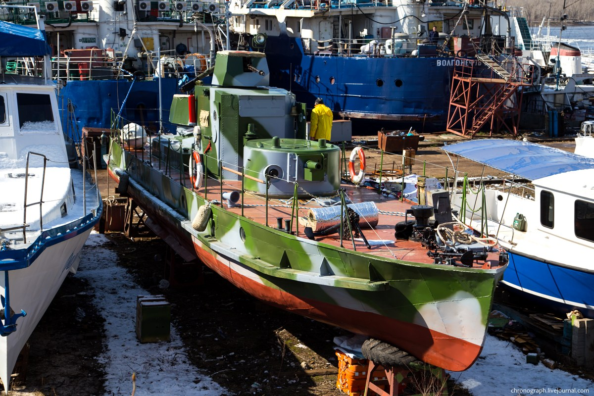 Копия бронекатера БК-73 проекта 1125 времён Великой Отечественной войны. Строительство бронекатера велось на Тольяттинском судоремонтном заводе. Многие использованные детали оригинальные